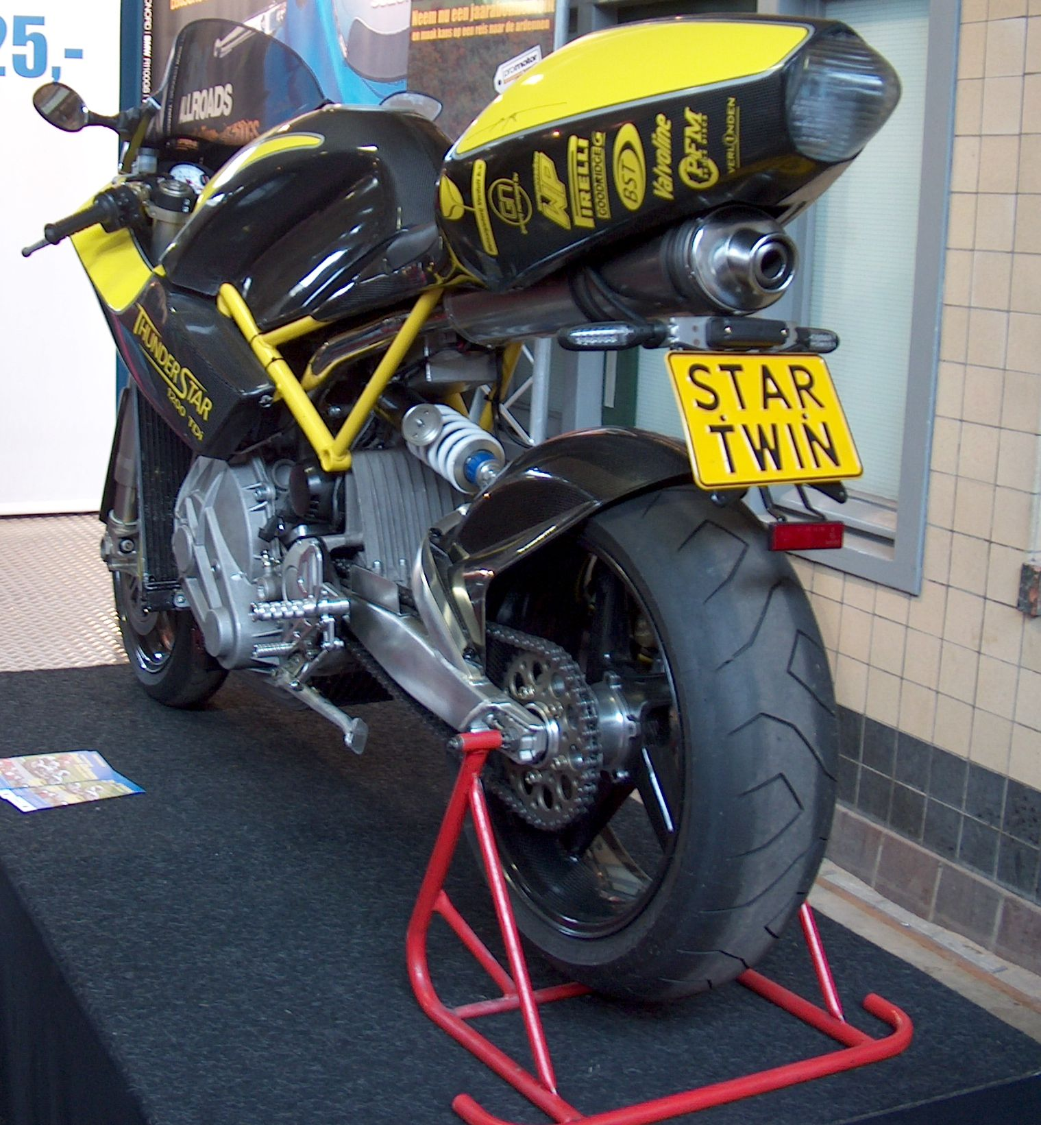 Toestemming van Henk Elshout